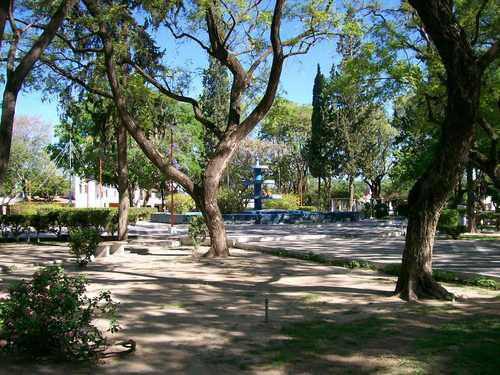 Plaza Principal de la Ciudad de Fernandez